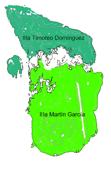 El Riu de la Plata té la particularitat de tenir dues illes properes però de nacions diferents. L'illa Timoteo Domínguez és uruguaiana i l'illa Martín García és argentina.